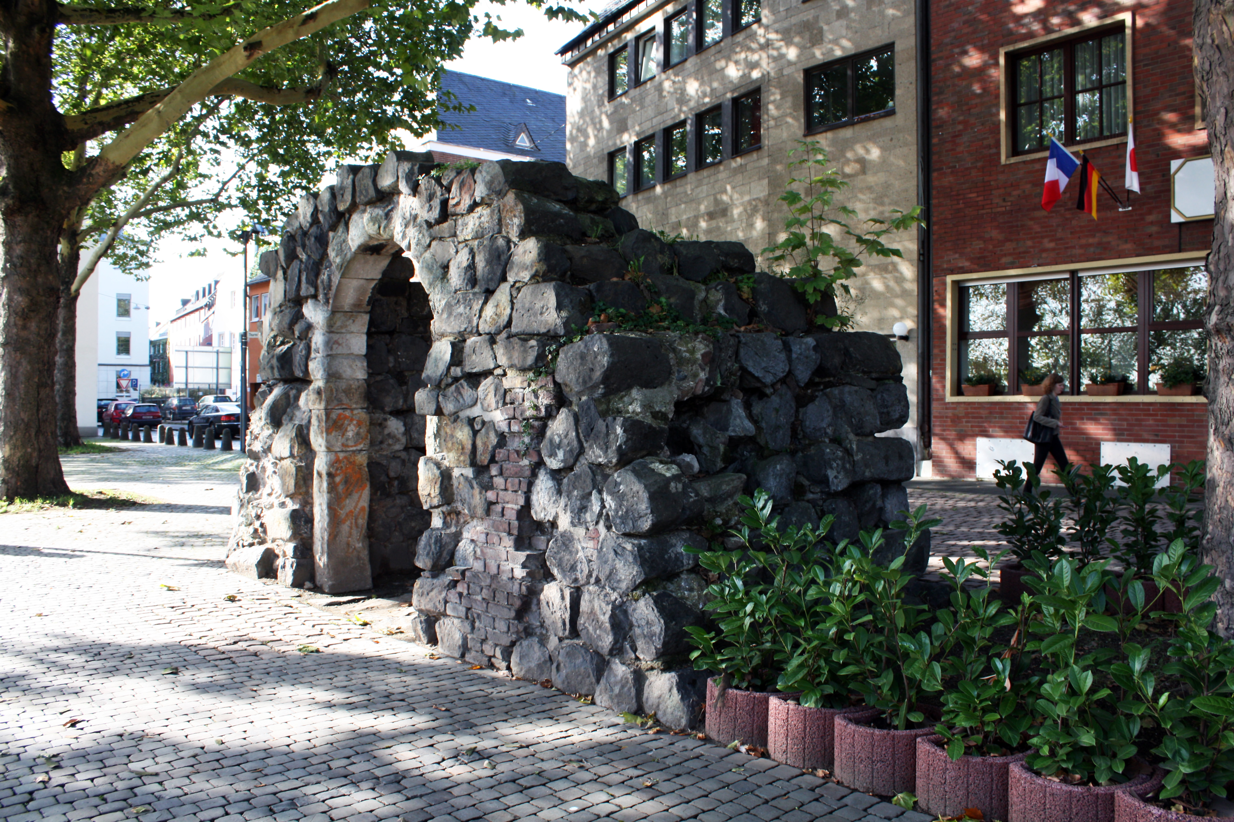 Köln, mittelalterliche Rheingassenpforte (Schlupfpforte) am Thurnmarkt